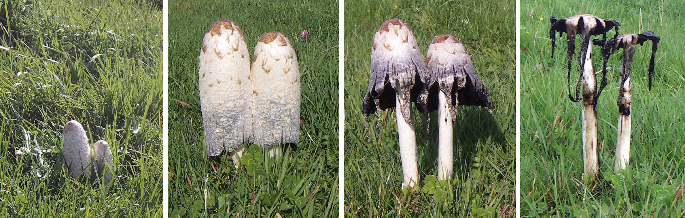 Schopf-Tintling an vier aufeinanderfolgenden Tagen, im Herbst, in der Eifel aufgenommen